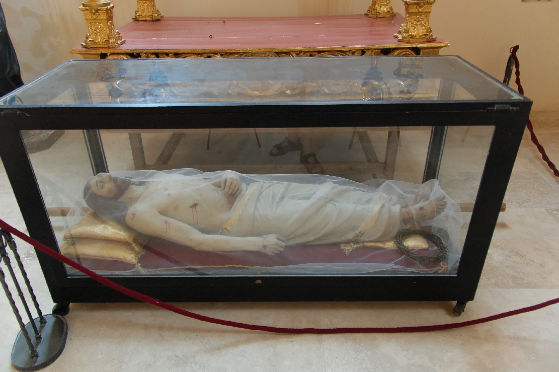 Atri 2011